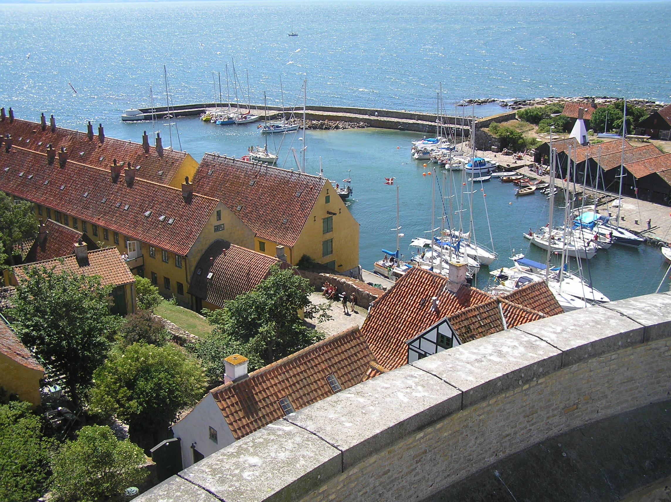 Harbour of Christiansø, Denmark